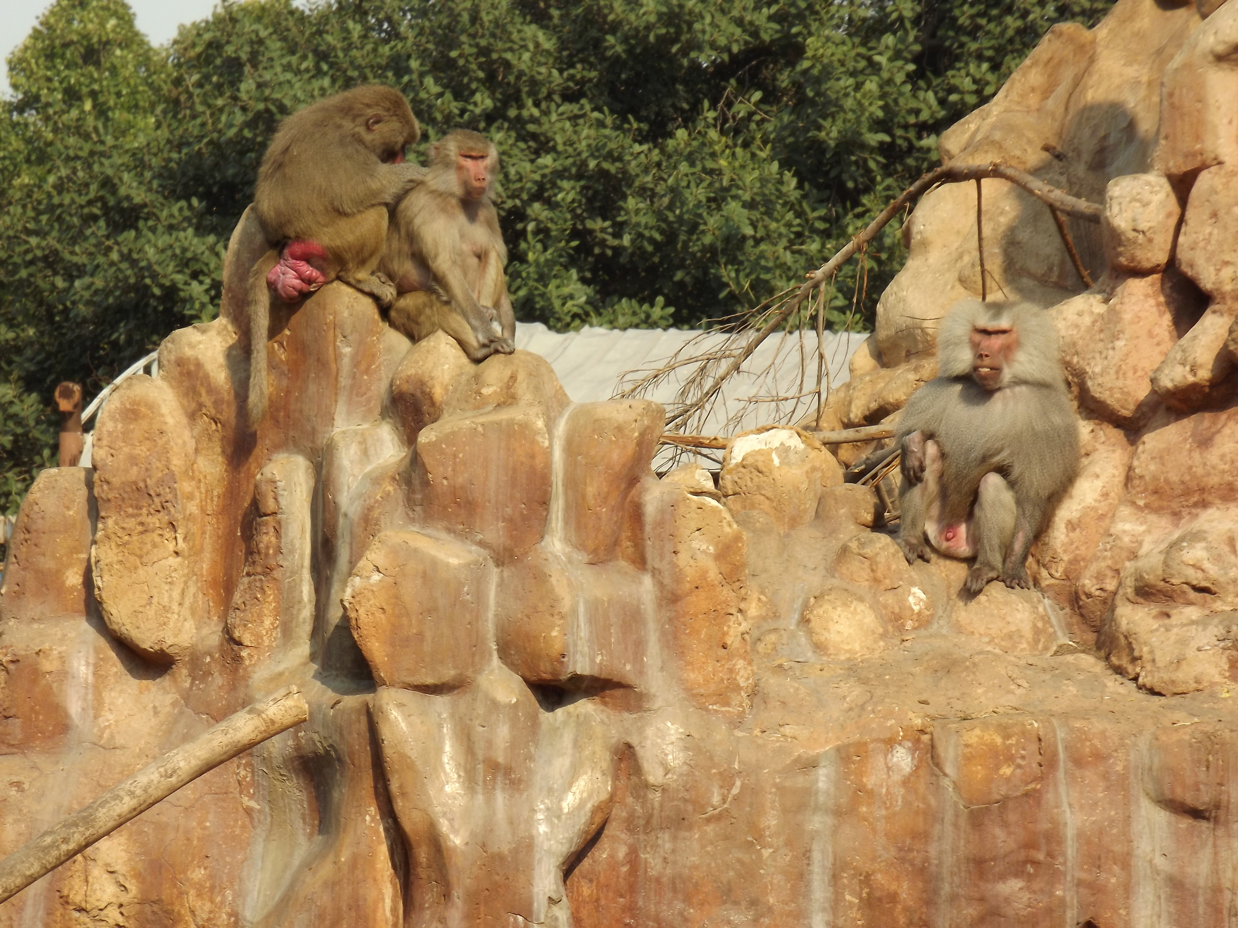 قرد حبشي في حديقة حيوان النزهة - الاسكندرية